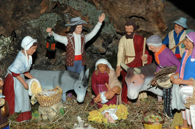 santons de 20 cm Paul Fouque, Aix en Provence